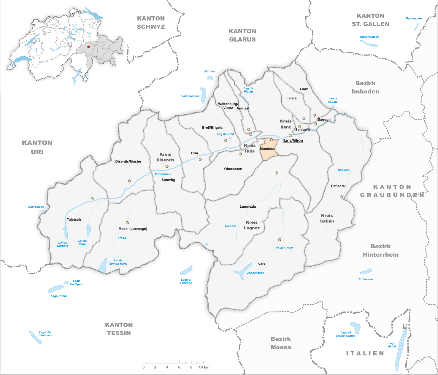 Municipality Mundaun